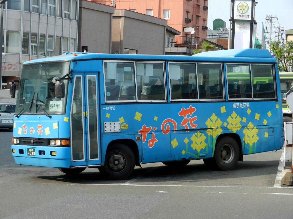 岩手県交通（一関営業所） いすゞ・ジャーニーQ （一関市営バス「なの花バス」専用車）